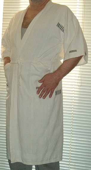 Heller Leinenbademantel, Hausmantel (mit Taschen, Gürtel und halblangen Ärmeln)